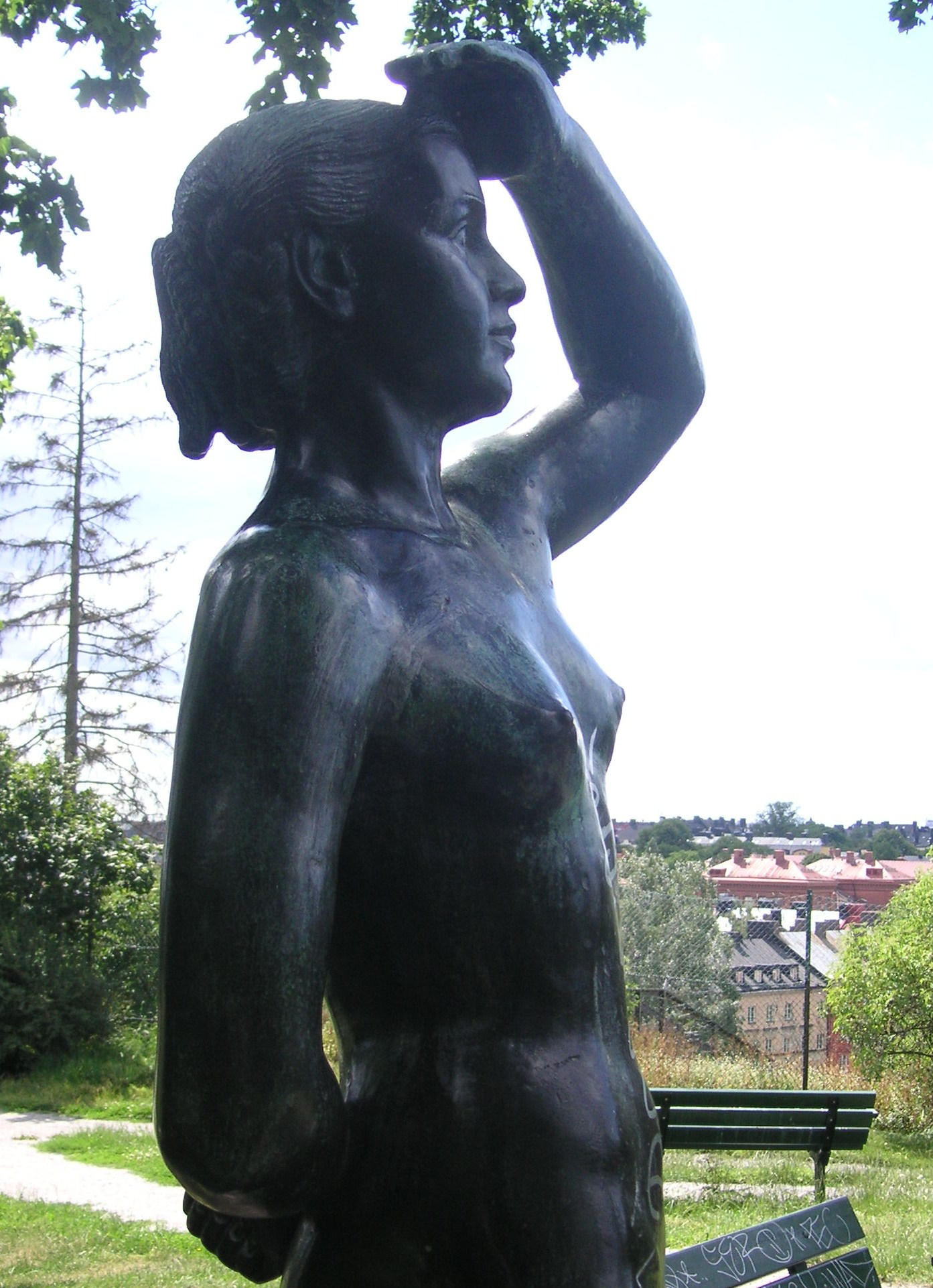 Anders Jönsson: "Flicka i aftonsol" i Vanadislunden i Stockholm. Skulpturen restes 1955 på en kulle i nordvästra delen av parken Vanadislunden.